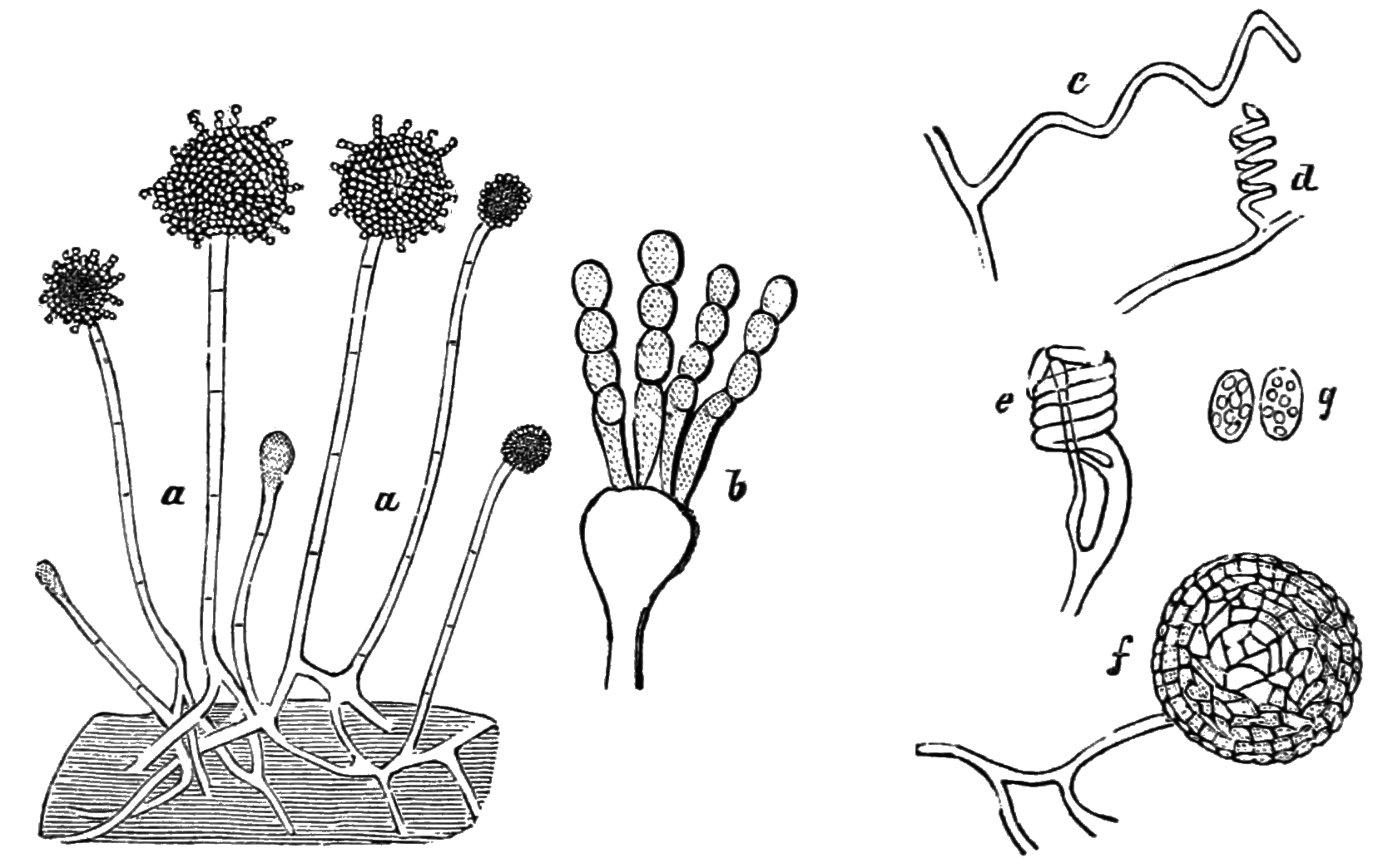 Eurotium aspergillus glaccus